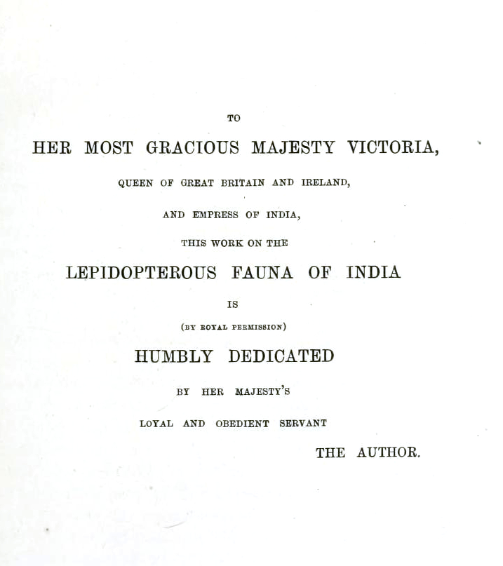 Dedication of Lepidoptera Indica Volume 1